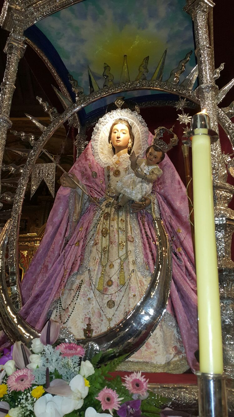 Imagen de Nuestra Señora de la Encarnación, Patrona de La Victoria de Acentejo.